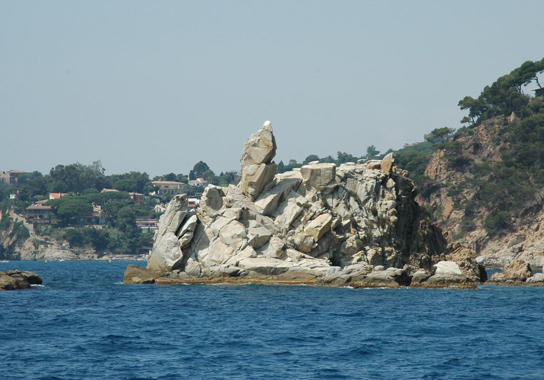 Punta de s'Agulla, Blanes, Girona